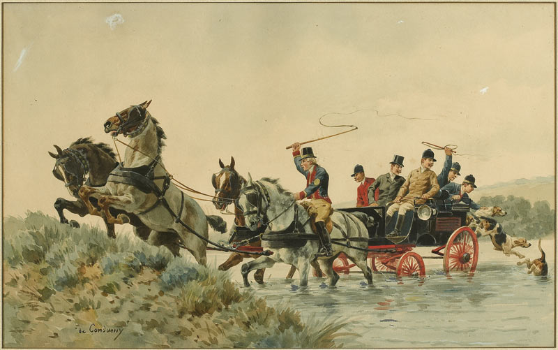 L'équipage.